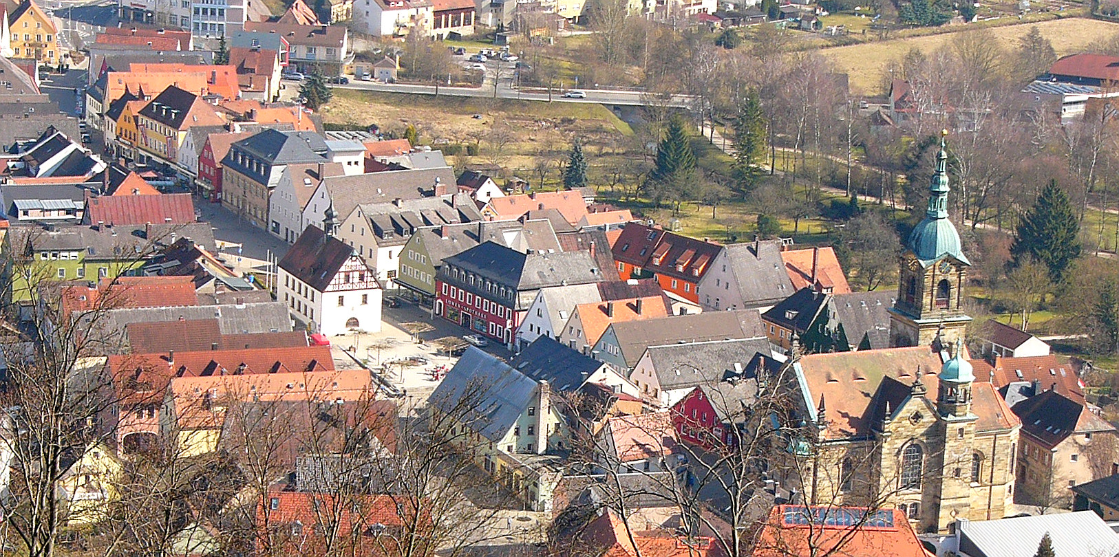 Ensemble Neustadt Pegnitz. Die Stadt Pegnitz wurde in der Mitte des 14. Jahrhunderts neu angelegt; diese Neustadt besitzt alle Merkmale der gotischen Stadtgründung.This is a photograph of an architectural monument.